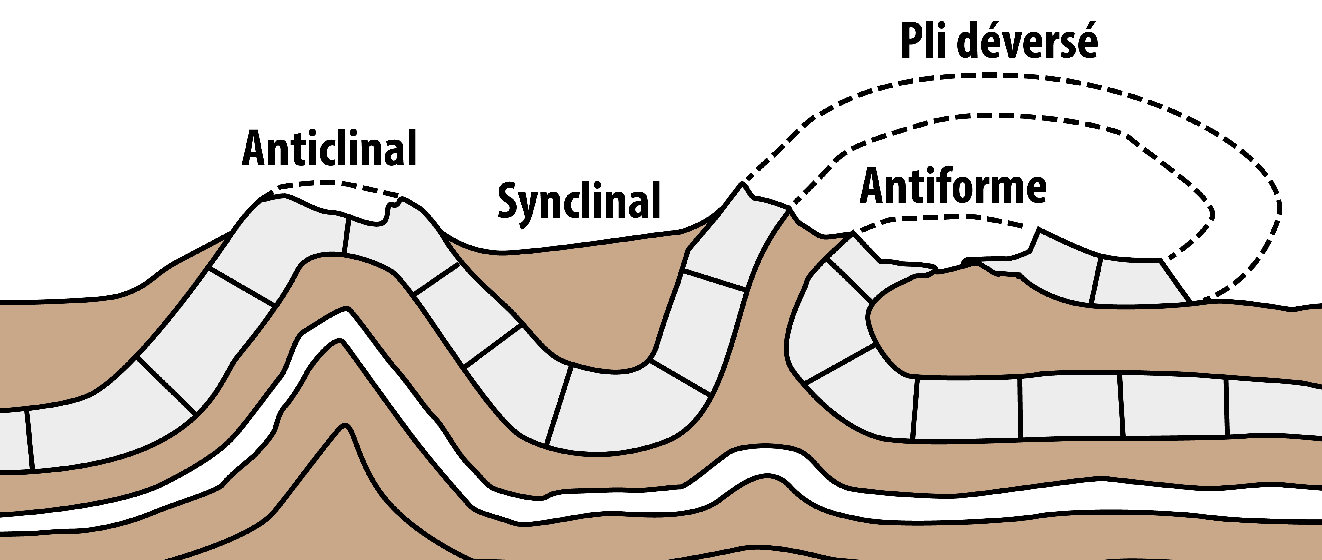 inspiré de